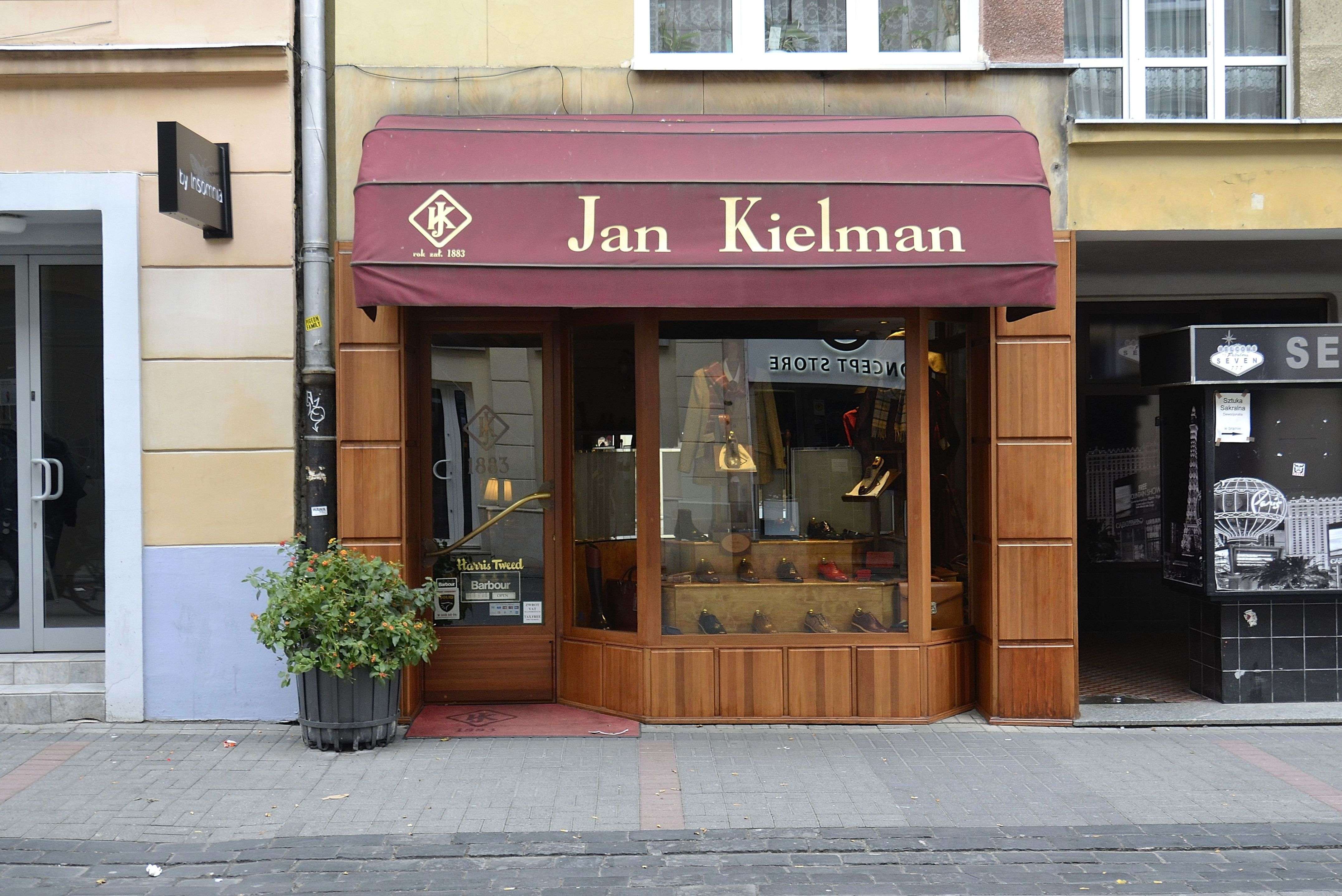 Siedziba spółki Jan Kielman przy ul. Chmielnej 6 w Warszawie